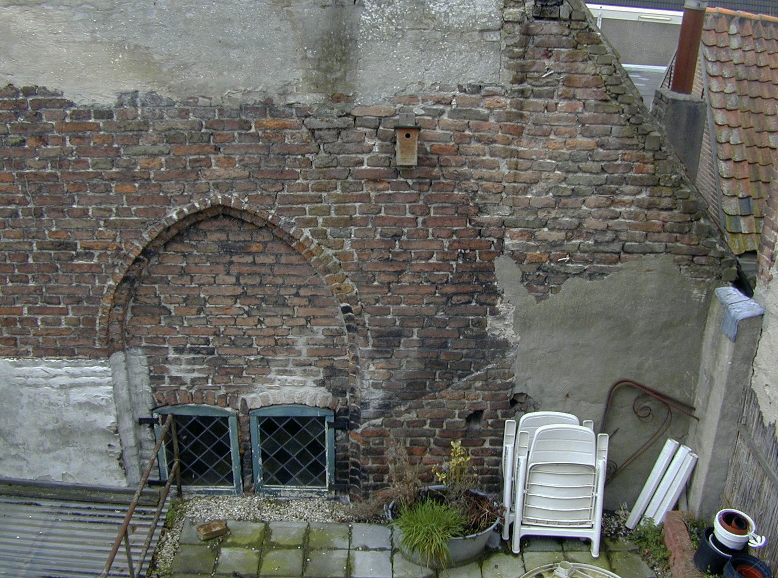 Voormalige smederij: Achterhuis, gevel van het kloostergebouw met venster